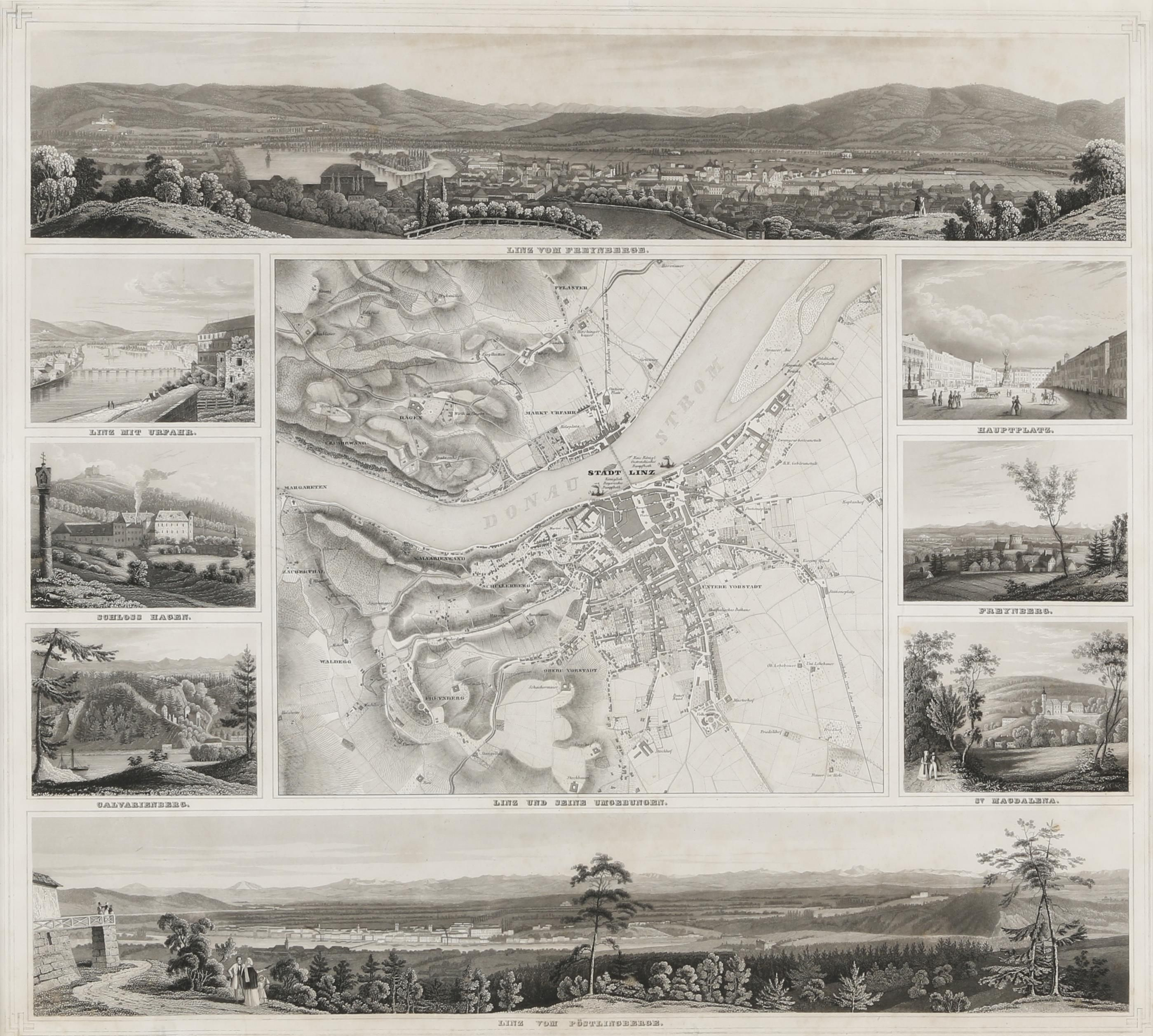 Karte "Linz und seine Umgebungen" und 8 verschiedenen Ansichten: "Linz vom Freyenberge, Linz vom Pöstlingberge, Linz mit Urfahr, Schloss Hagen, Galvarienberg, Hauptplatz, Freynberg, St. Magdalena" Verlag von Vinzenz Fink, ca. 51 x 57 cm